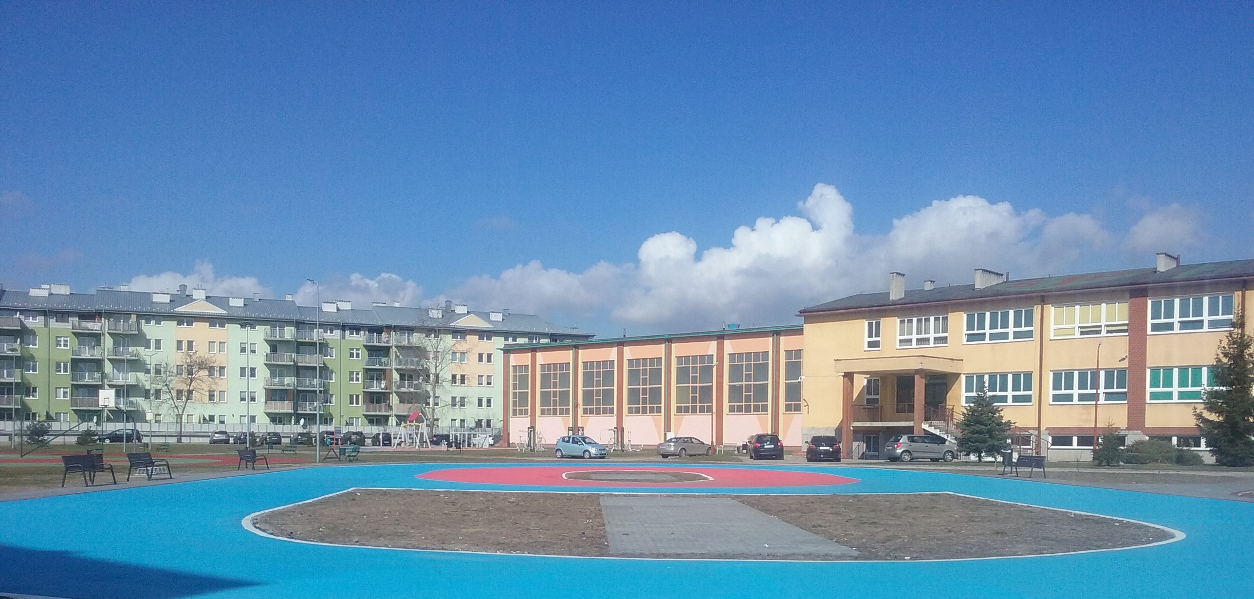 Jeden z ogólnodostępnych torów wrotkarskich w 60-tysięcznym Tomaszowie Mazowieckim. Szkoła Podstawowa nr 1